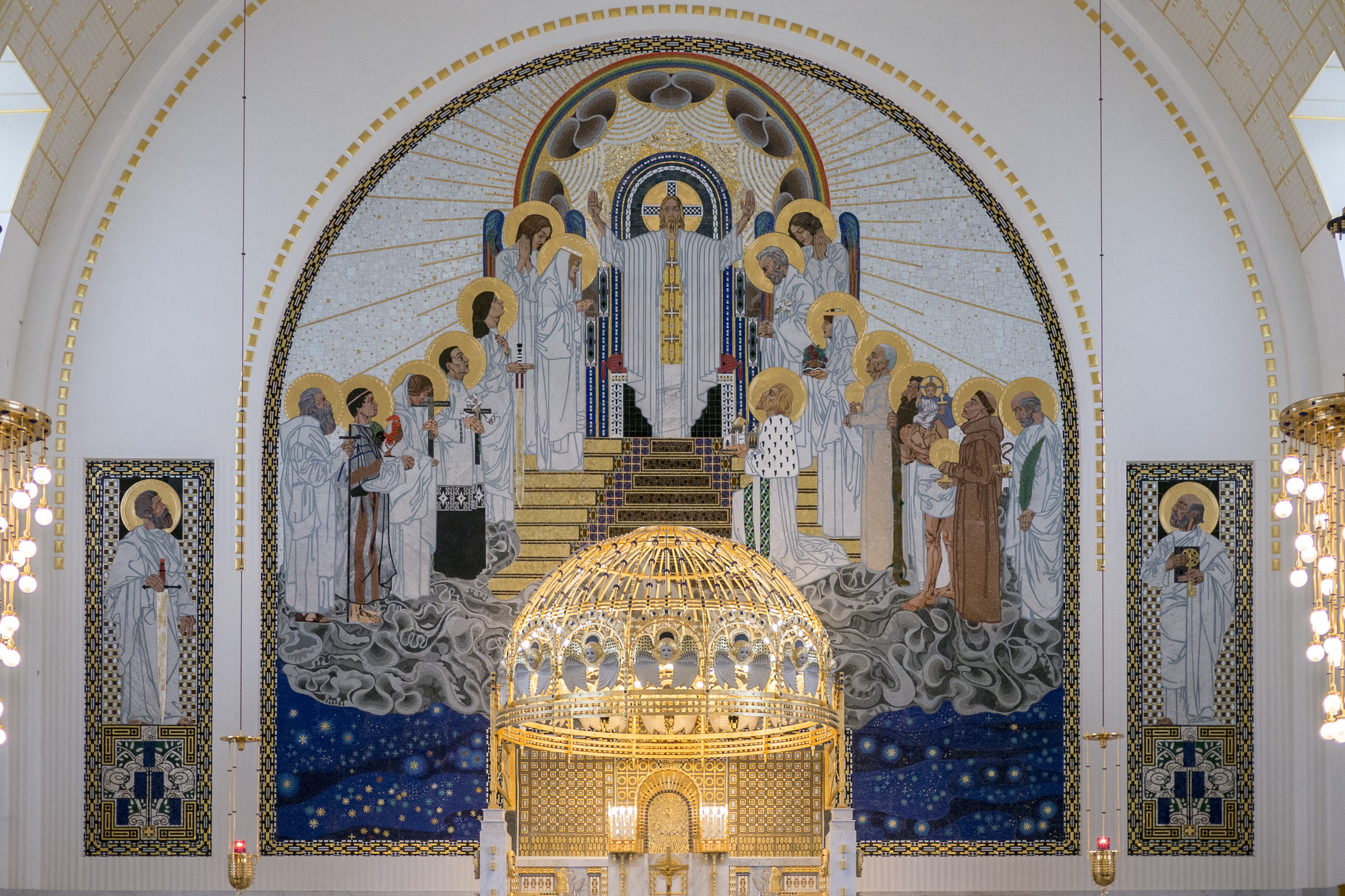 Steinhofkirche Altarbild